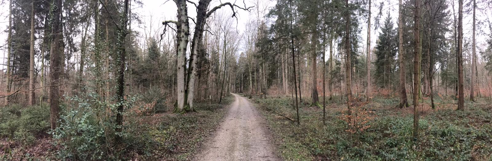 Eichenweg mit Vierereiche im Güttinger Wald